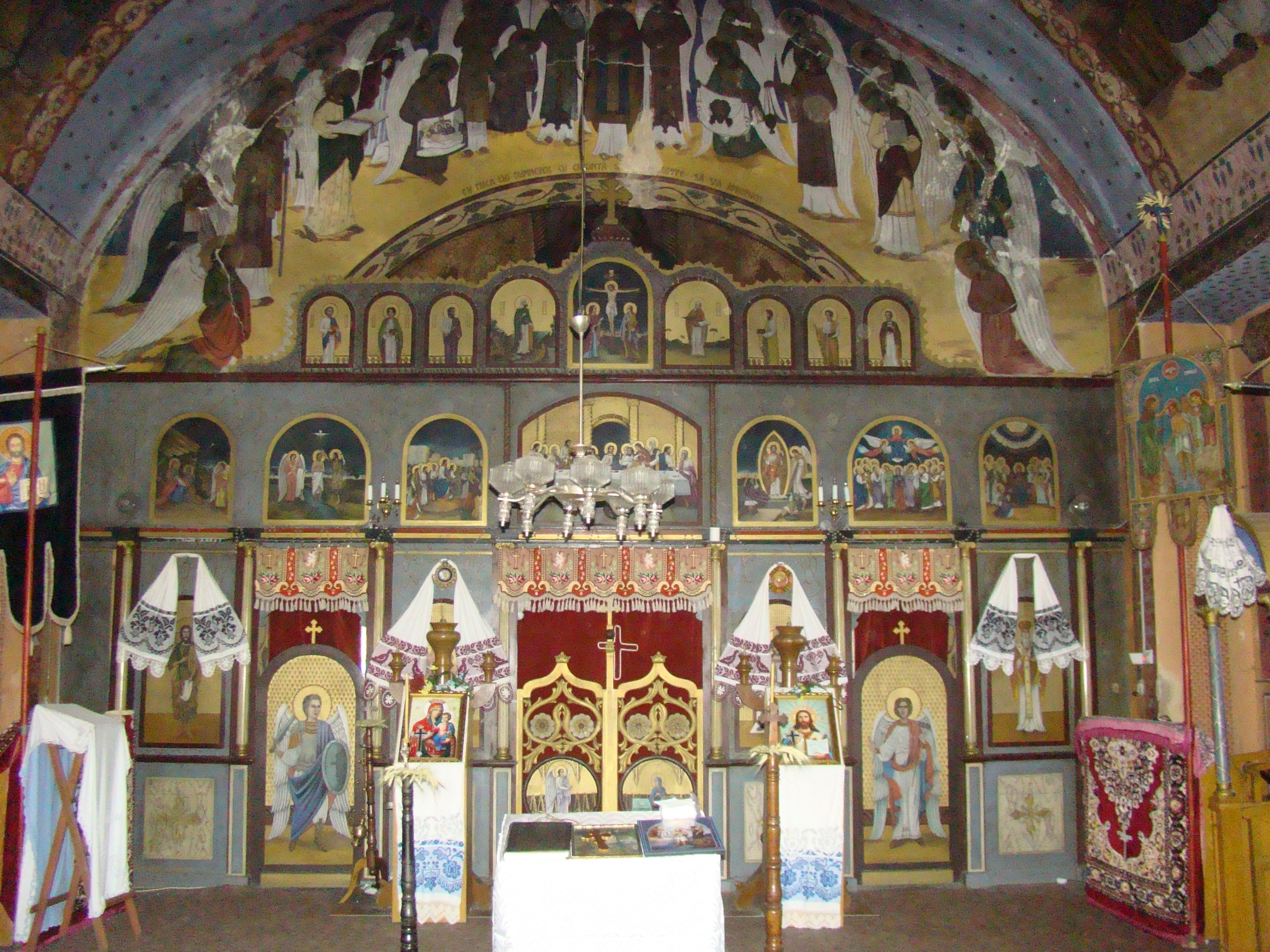 Biserica „Sf. Nicolae", sat DOBROŢ; comuna TOMEŞTI